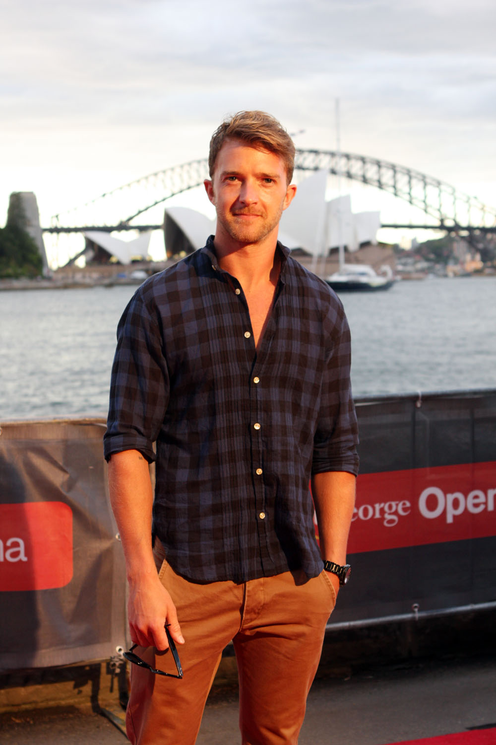 Tim Draxl